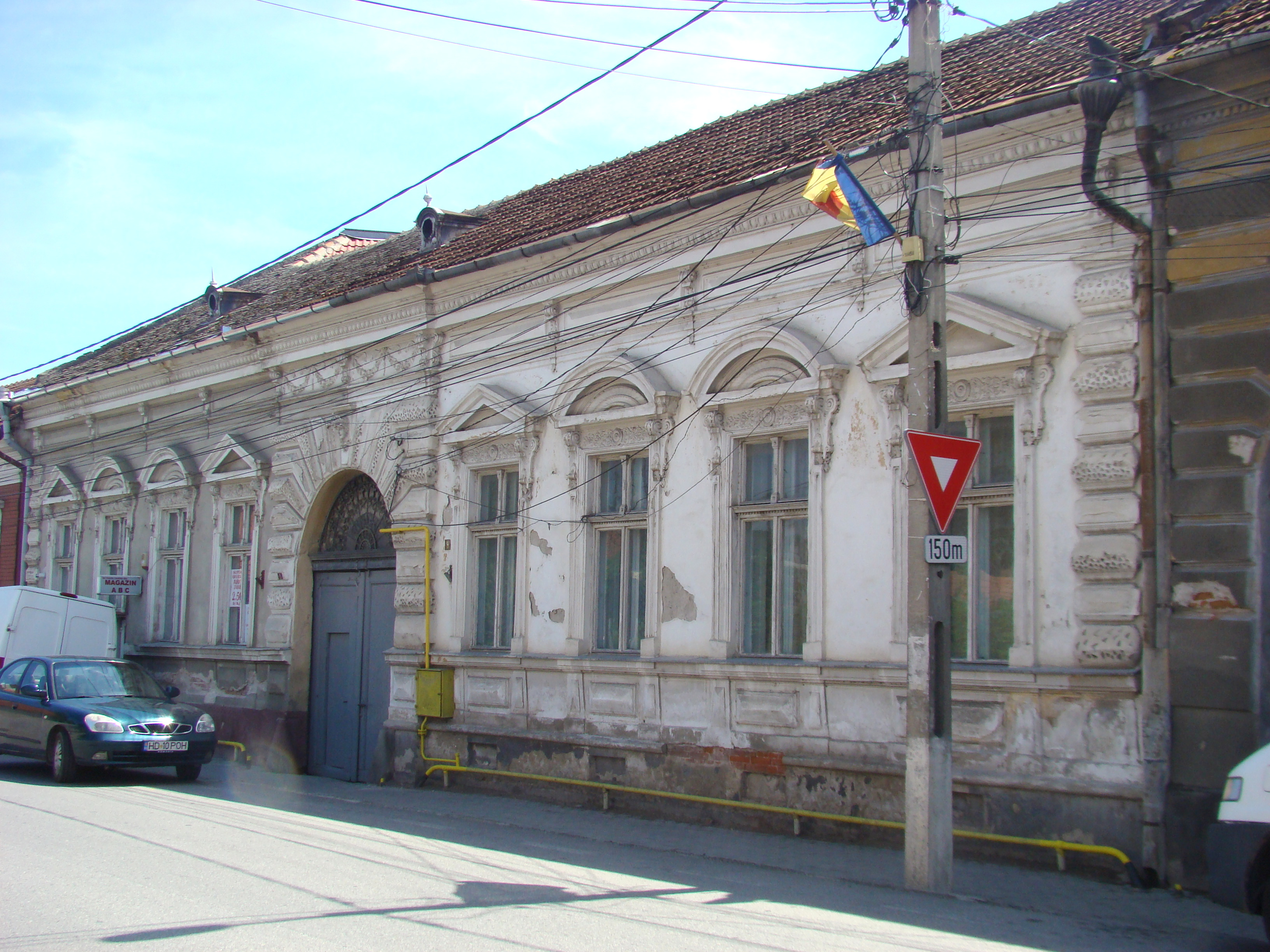 Ansamblul urban „Str. Horea”, oraș Hațeg, Str. Horea 1-13, 2-16 05